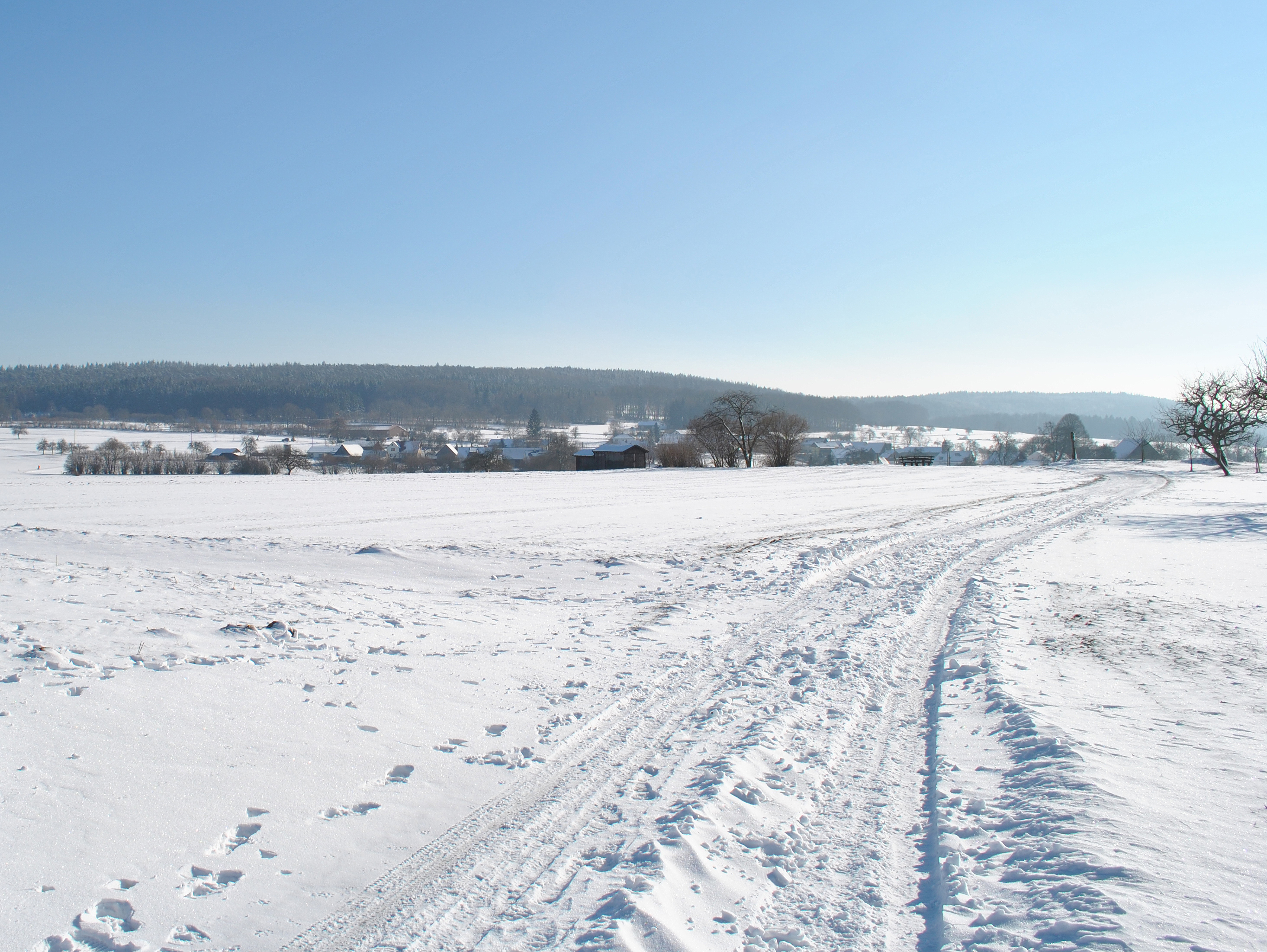 Hesselbach im Winter